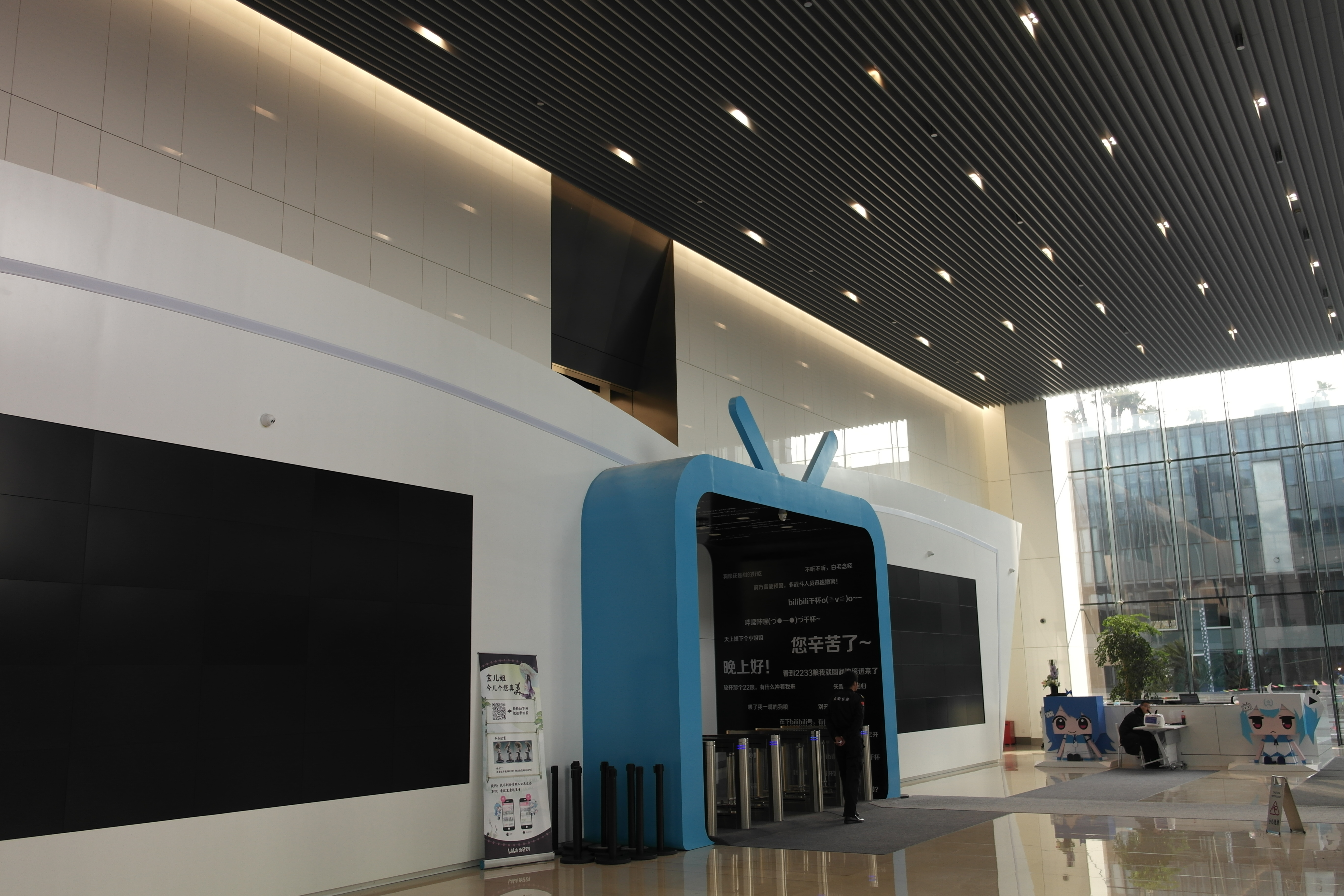 ビリビリ会社のドア